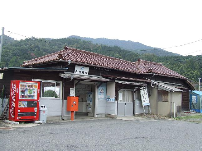 JR西日本芸備線井原市駅の駅舎